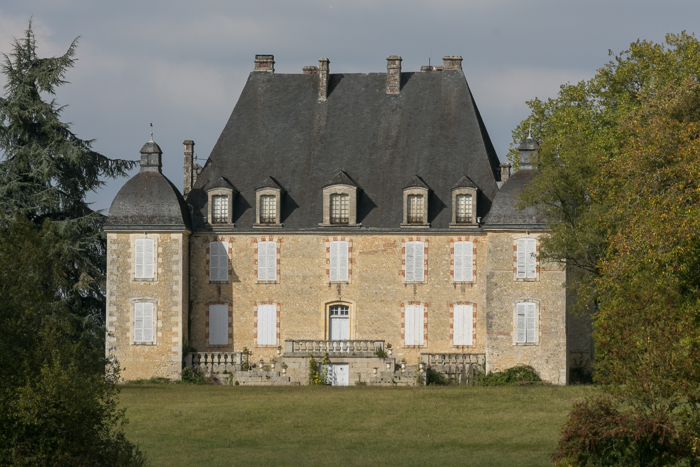 Château d'Aunay-les-Bois. .